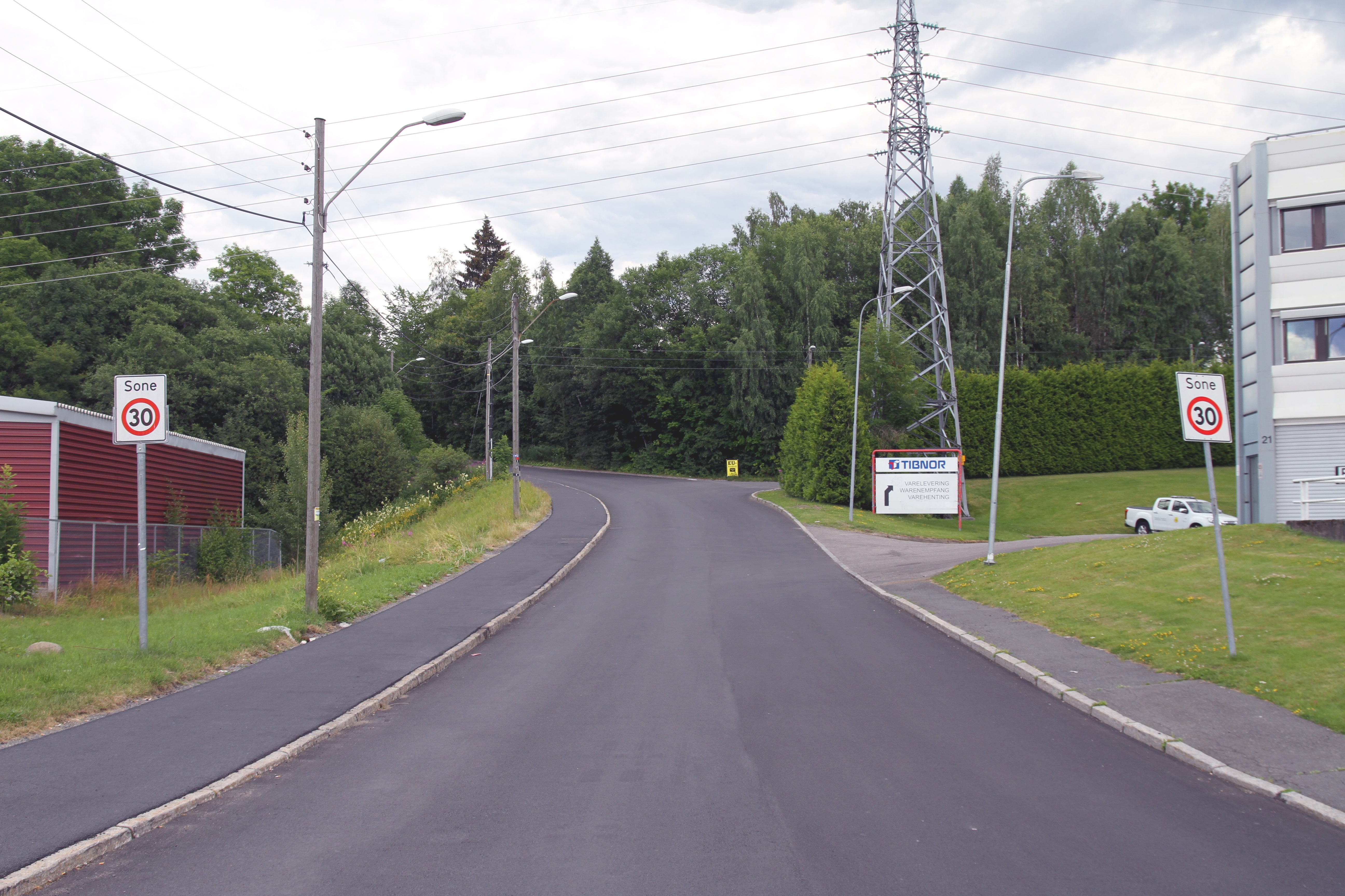 Micheletveien i Oslo.